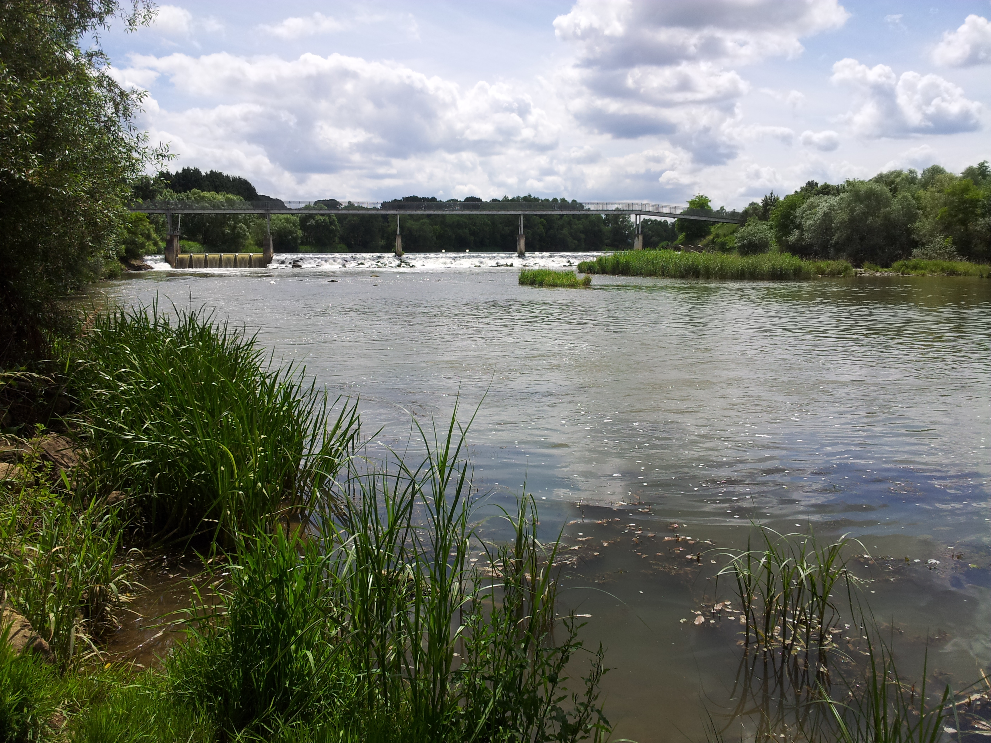 La Meurthe au lieu-dit Le Moulin Noir, sur la commune de Lay-Saint-Christophe. Vue vers l'amont.